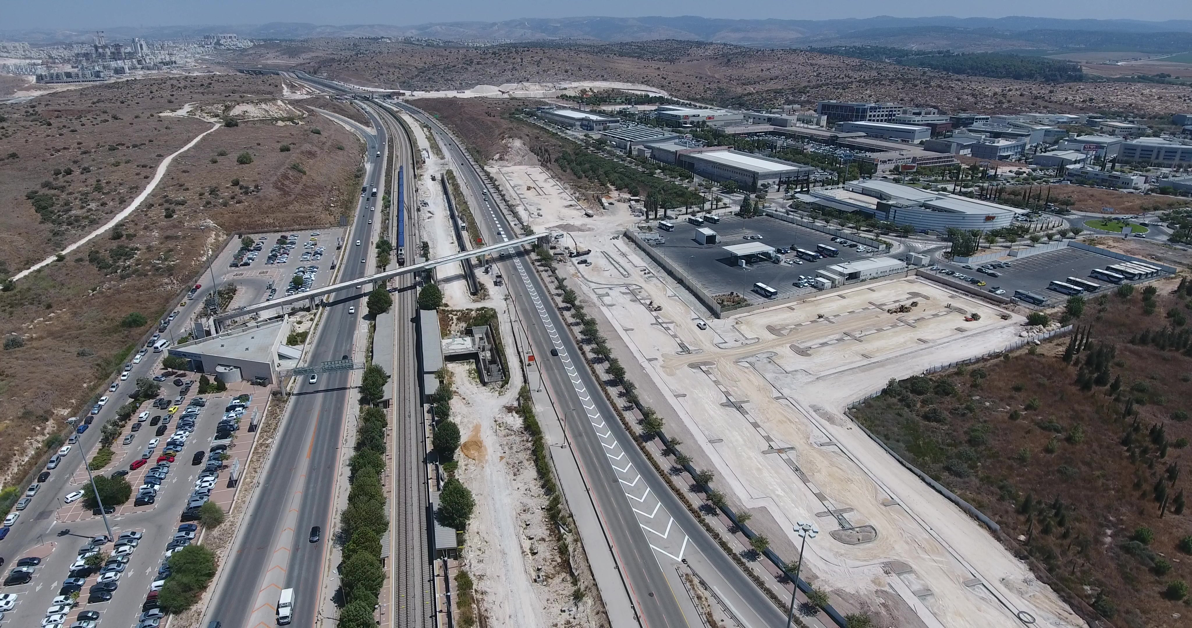 תחנת הרכבת פאתי מודיעין, רציפים 3 ו4 בבניה, אוגוסט 2019